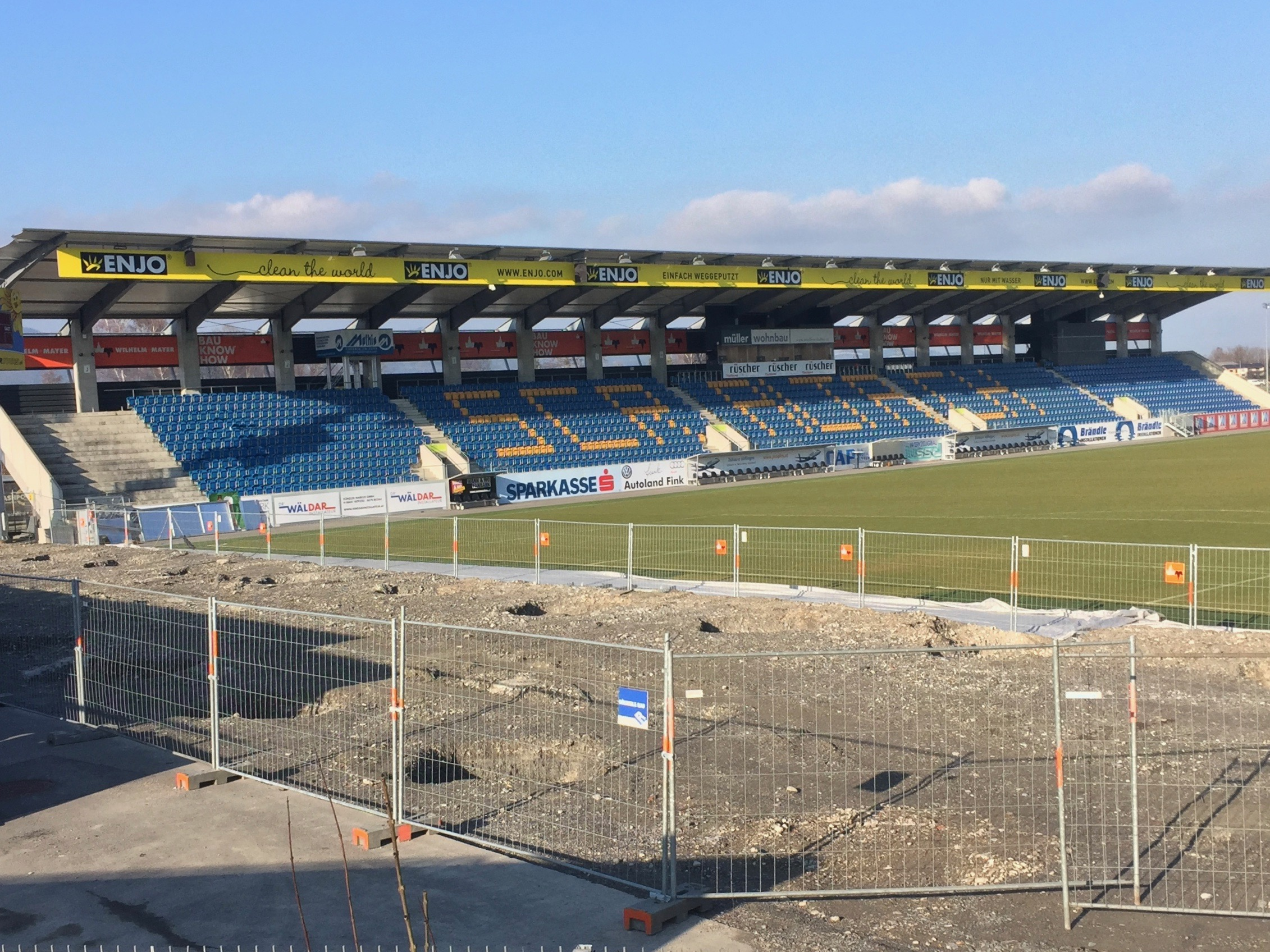 Blick auf Südtribünen-Baustelle in der Altacher Cashpoint-Arena im Jänner 2018.